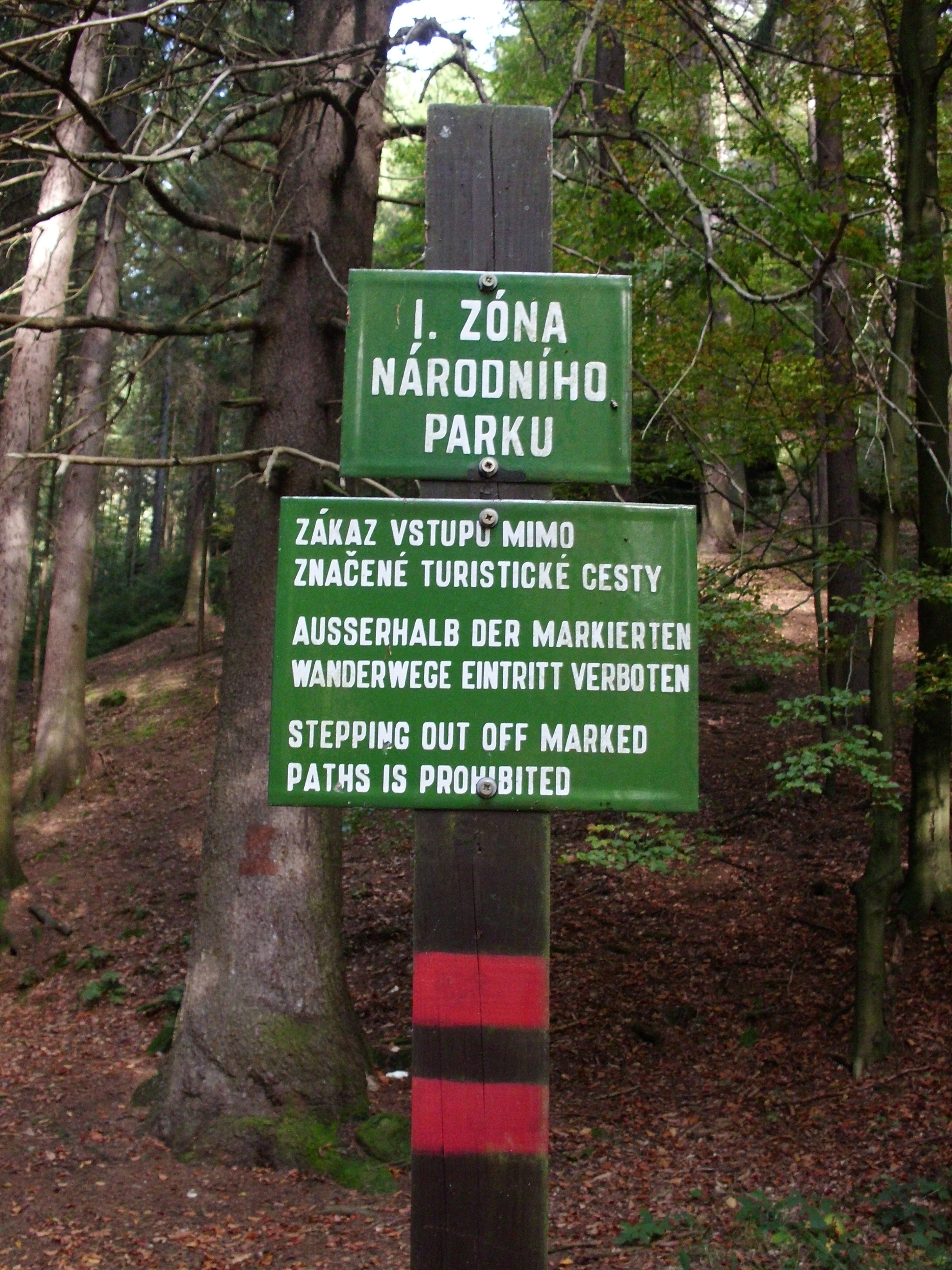 Označení 1. zóny Národního parku České Švýcarsko